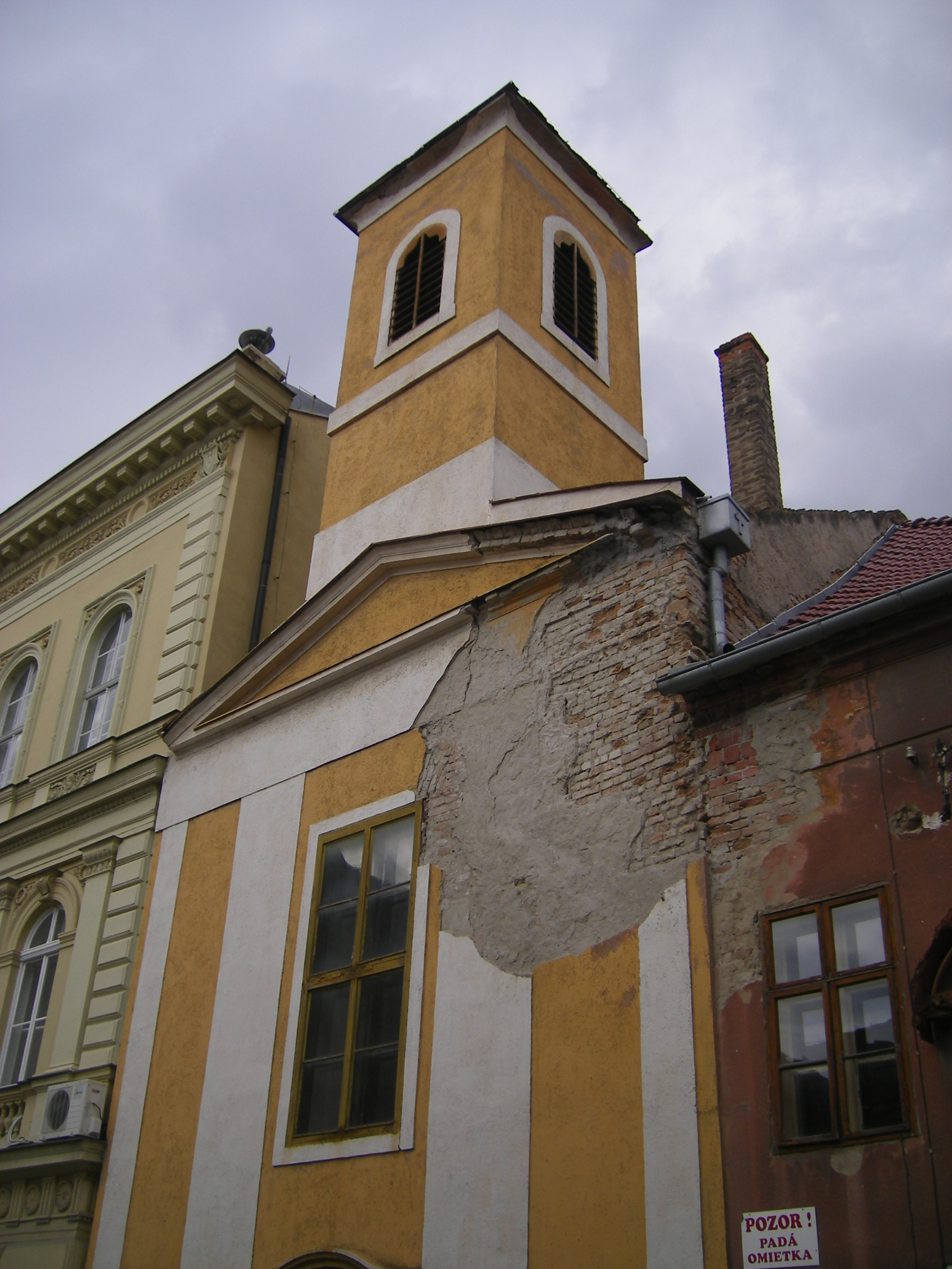 Komárom - Szt. Anna-kápolna a Jókai utcában, a városháza mögött